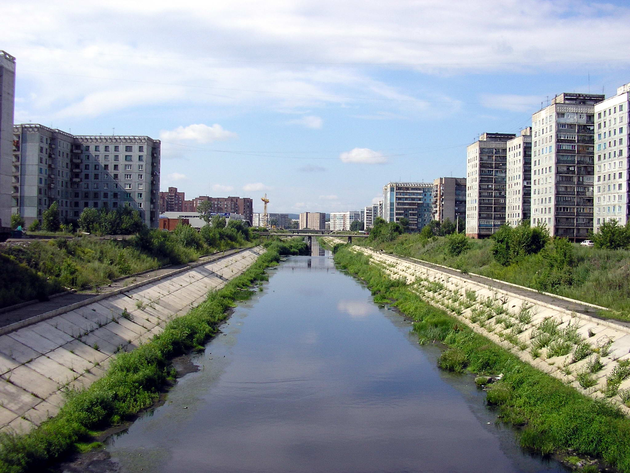 Река Аба в Новокузнецке